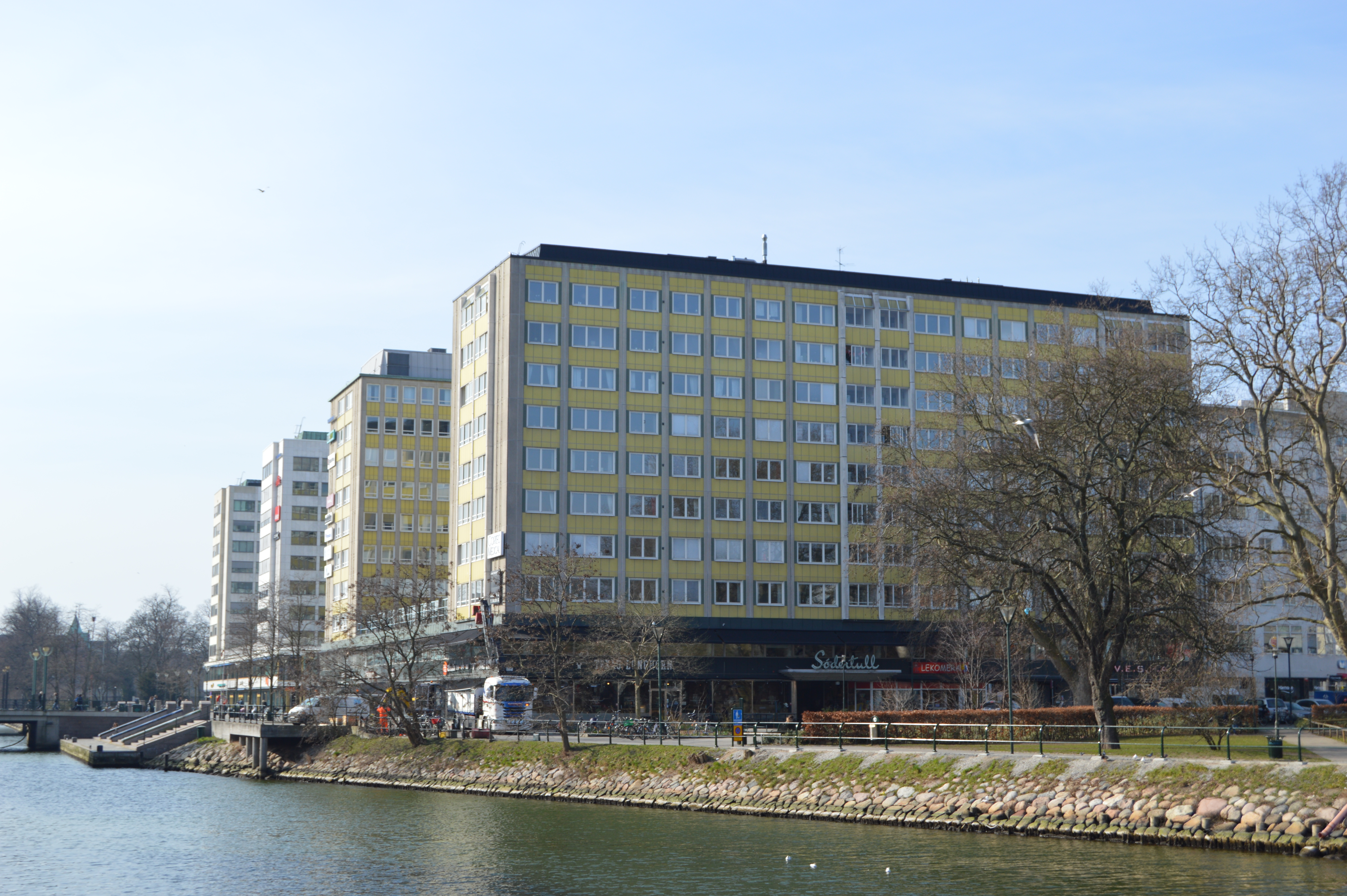 Byggnaderna vid Södertull i Malmö.